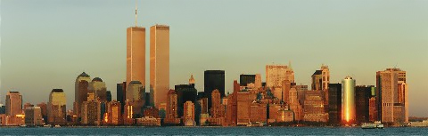 New York City - Skyline in der Dämmerung Aufnahme von focus mankind (Original text: New York Skyline um 1991) Aufnahme: 1990